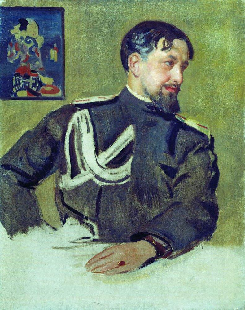 Портрет художника Николая Милиоти